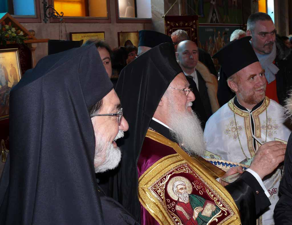 Foto di sua santità Bartolomeo I, patriarca ecumenico di Costantinopoli in visita al monastero di Montaner di Sarmede.